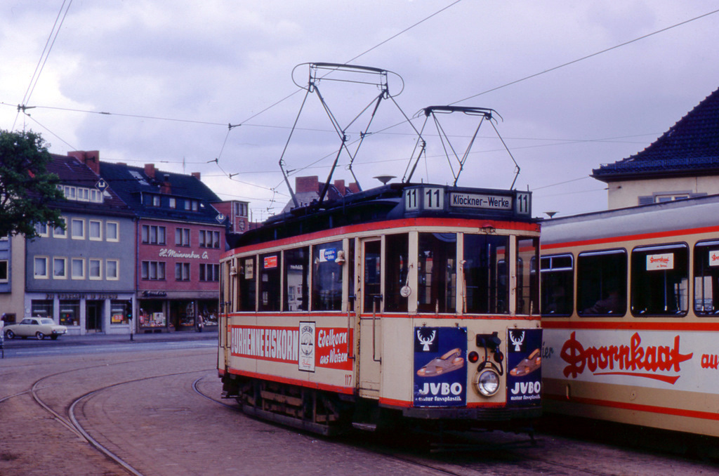 Straßenbahn Bremen, Wagen Nr. 117 am Sonntag, den 18. Mai 1963 in der Wendeschleife Gröpelingen